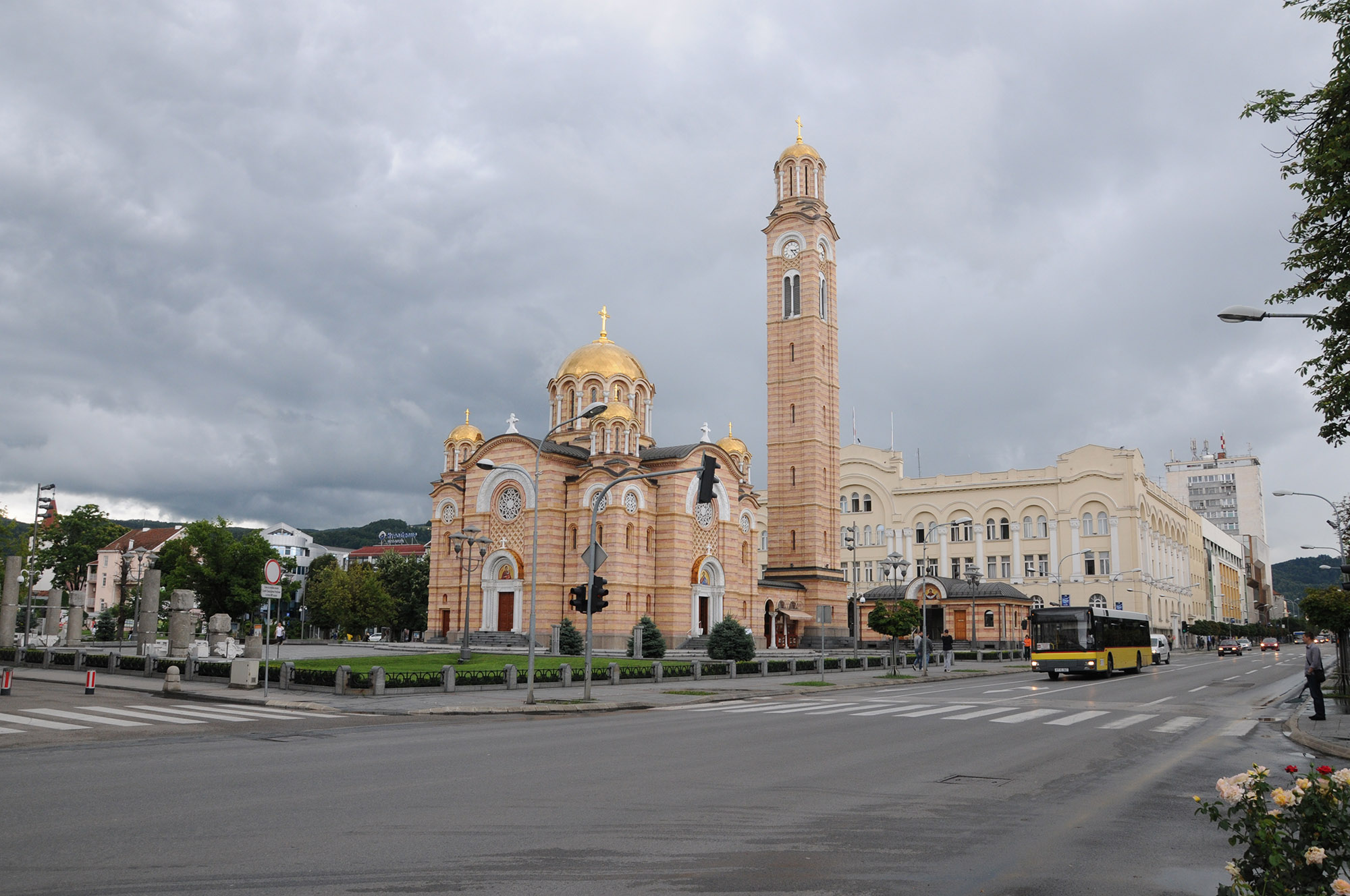 Hram Hrista spasitelja Banja Luka Сликава е подигната во рамките на проектот „По трагата на душата 2015“.